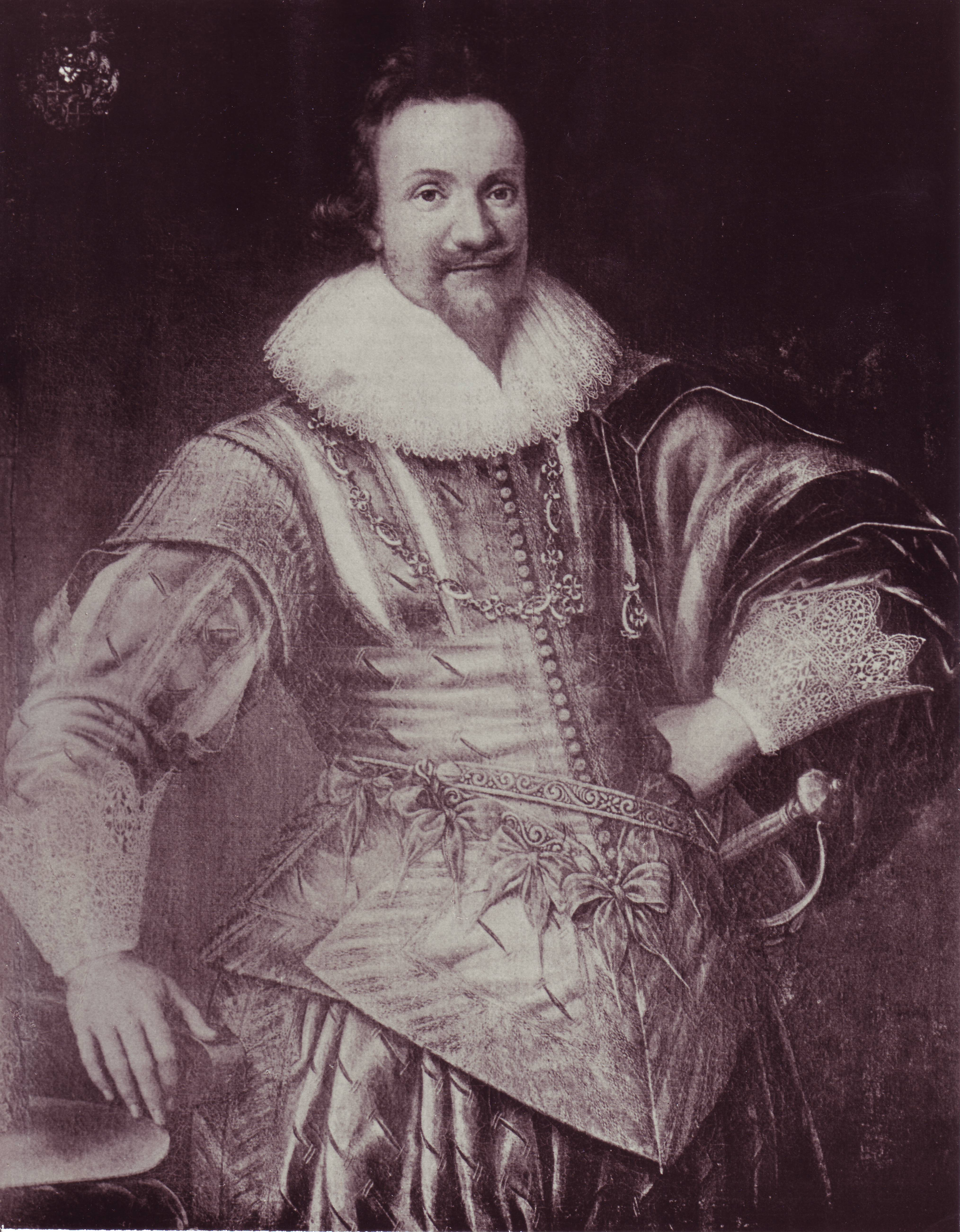 Ein Gemälde von Johann von Bodeck (dem Jüngeren, * 22.12.1589 in Frankfurt, † 19.11.1650 in Utrecht)